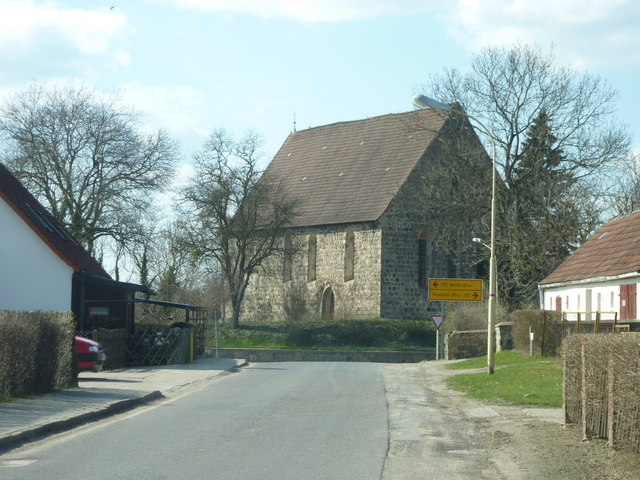 In Mittenwalde bei Templin (Uckermark).